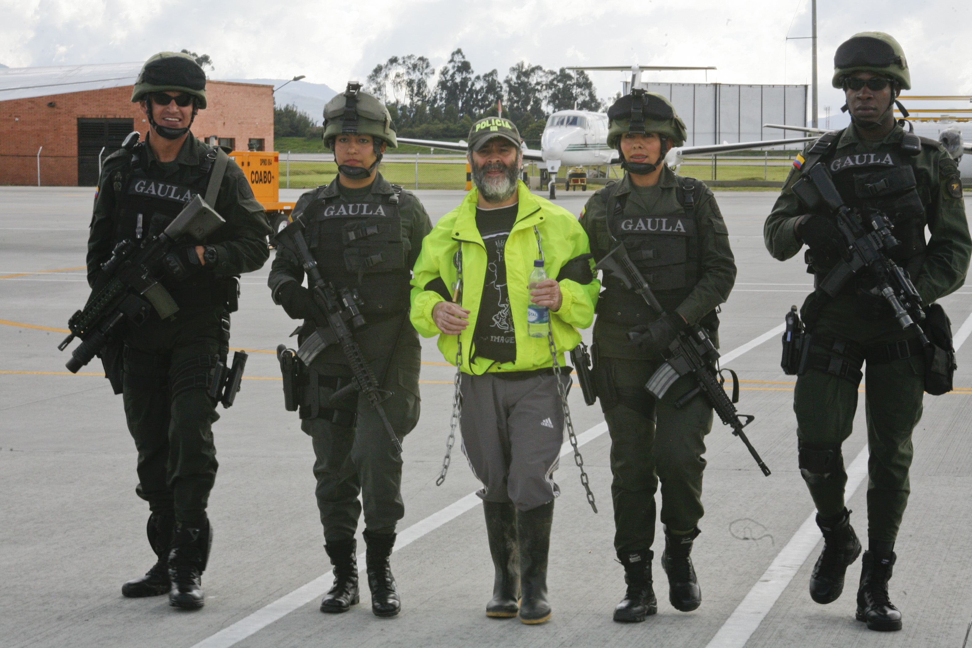 Pedían mil quinientos millones de pesos, La víctima llevaba 55 días secuestrado. Durante el operativo se capturaron dos secuestradores.